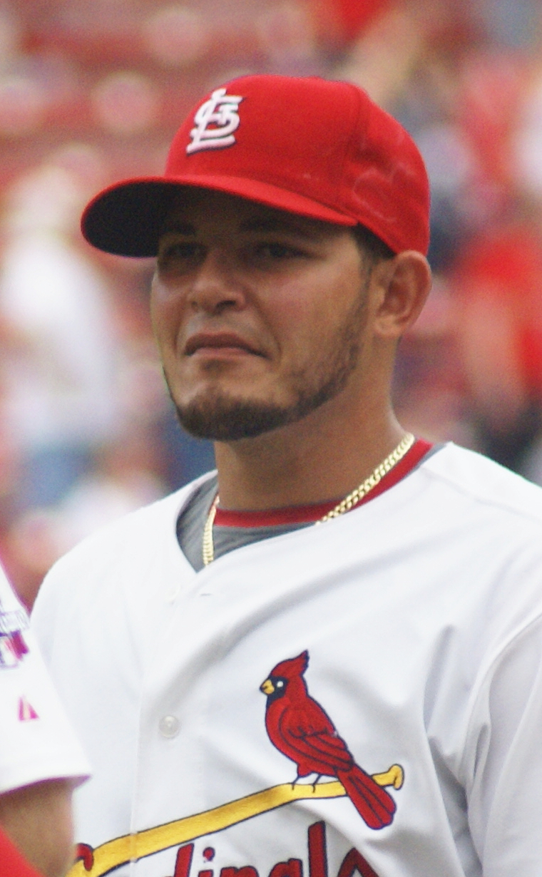 Yadier Molina